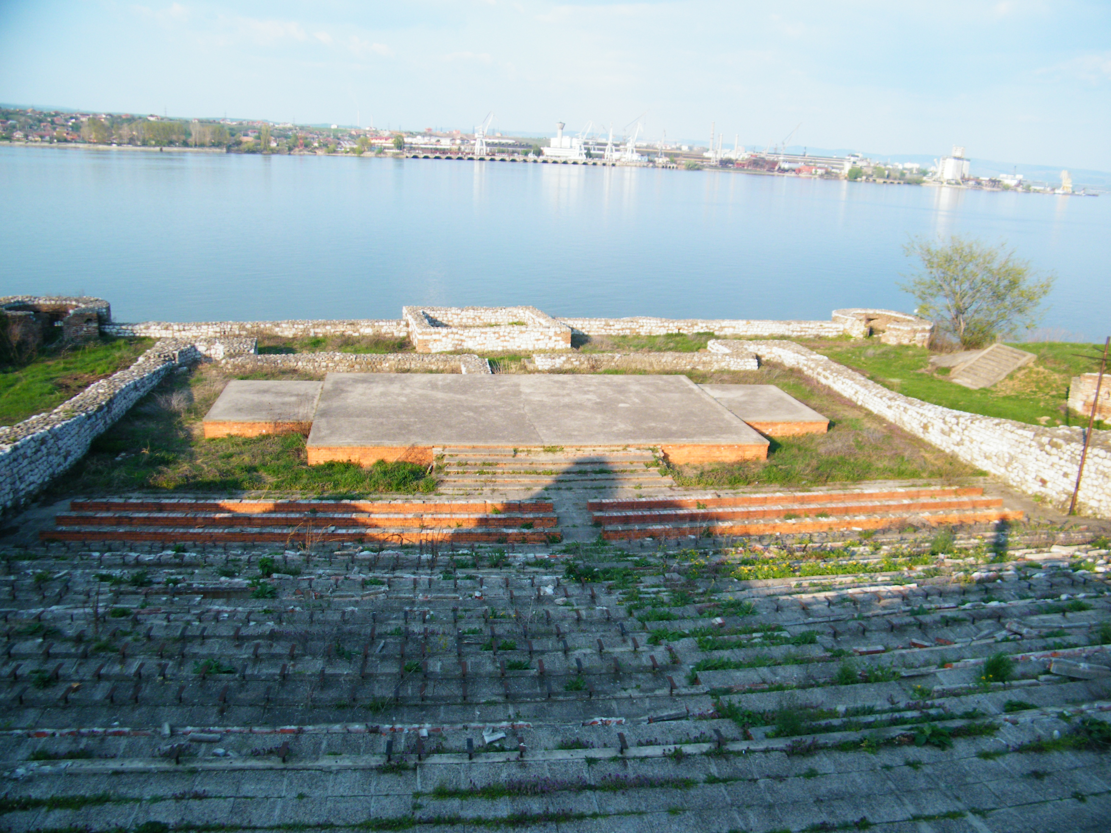 Српски (ћирилица): Тврђава се налази близу Кладова и била је важна стратешка тачка за османлијско освајање Аустро-Угарске.